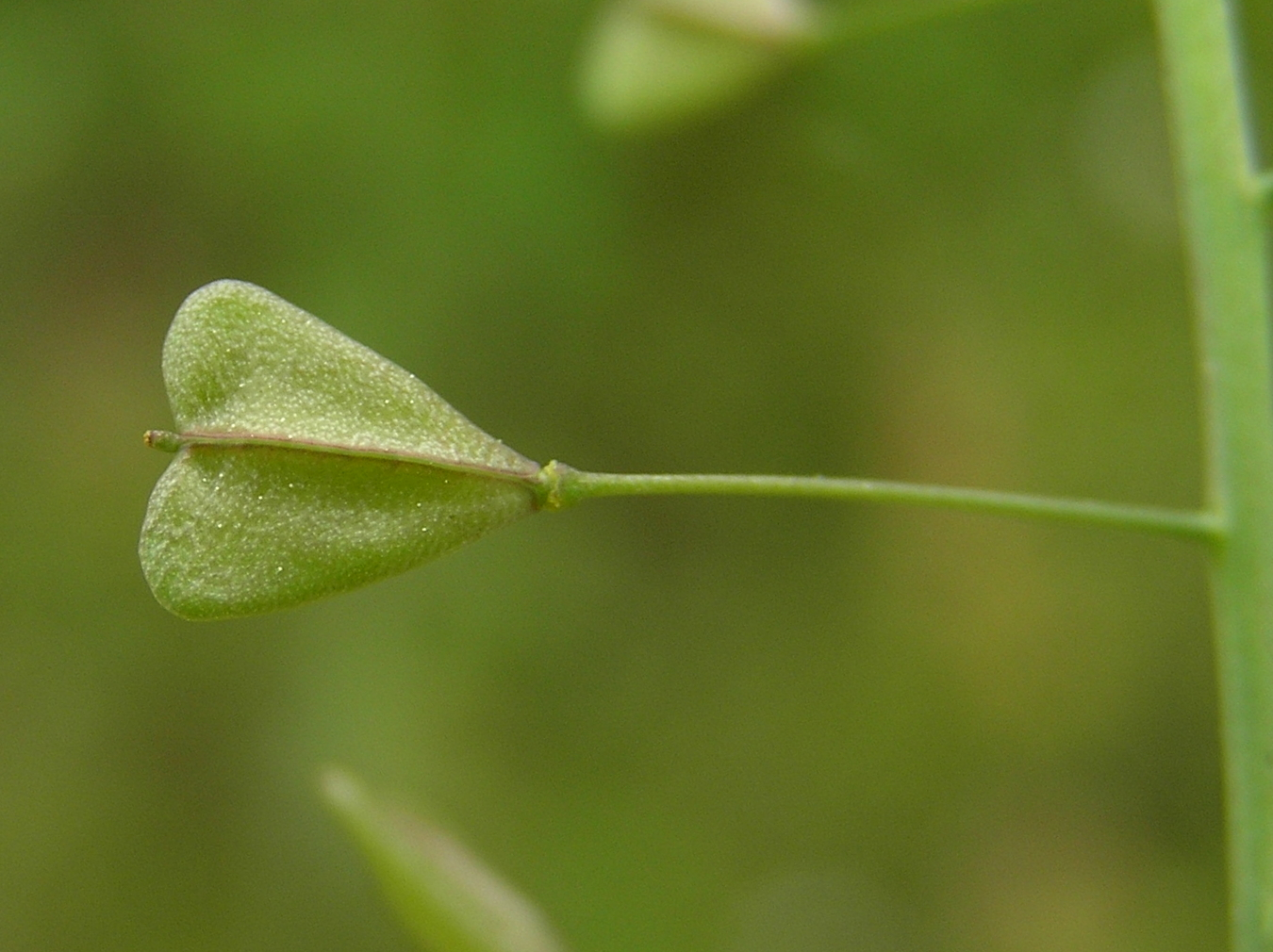 Capsella bursa-pastoris, Tasznik pospolity, Białowieża, Polska